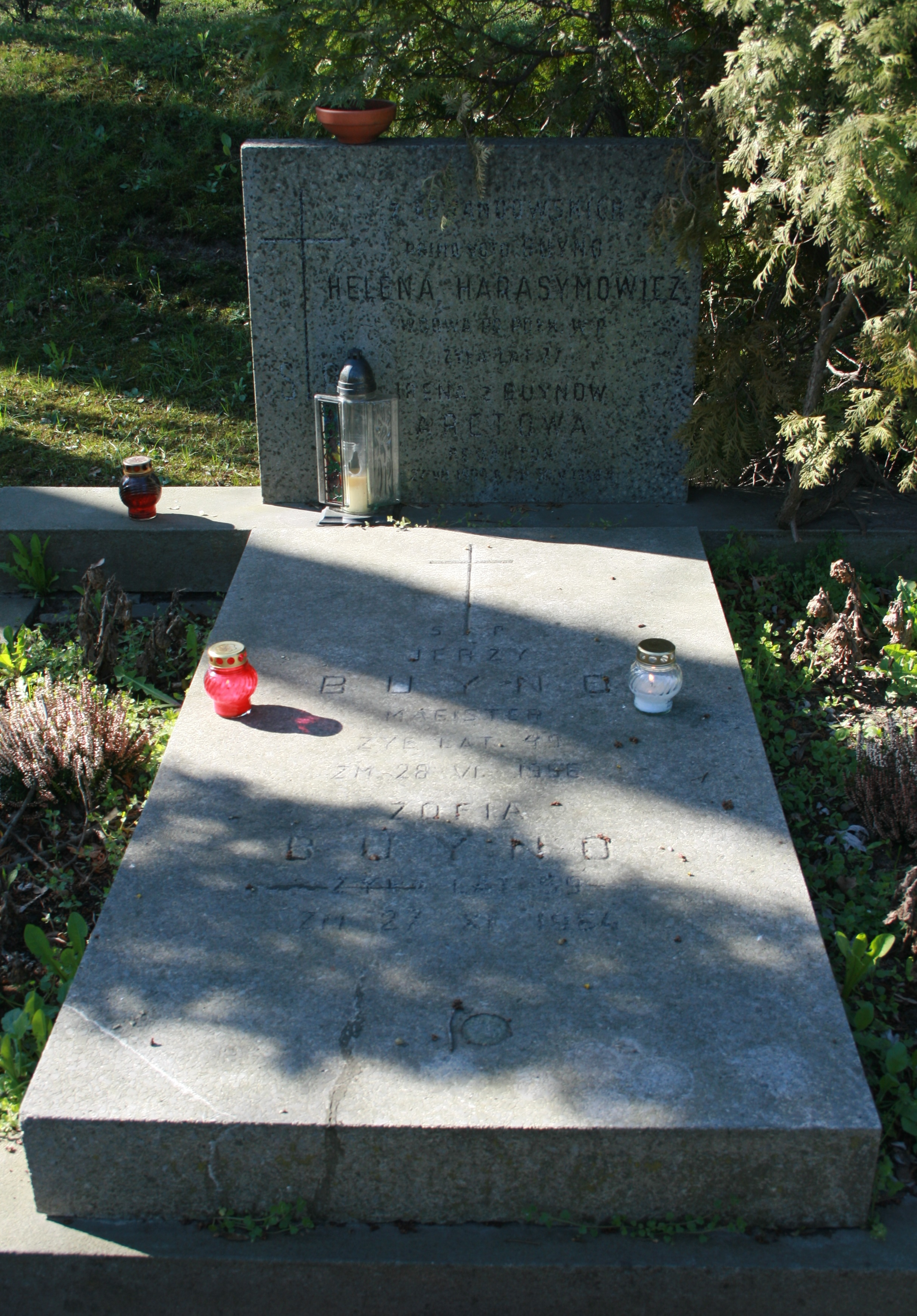 Grób na Powązkach Wojskowych w Warszawie